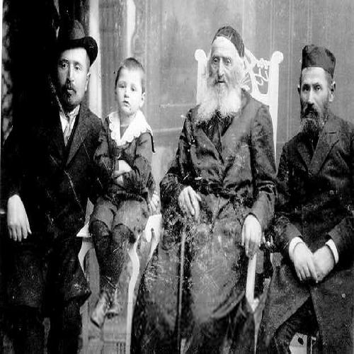 משפחת כצנלסון, בוברויסק. ארבעה דורות, מימין: ניסן כצנלסון, אביו שאול- שמואל בני'ס, קלמן כצנלסון, שמואל כצנלסון, 1911- 1912